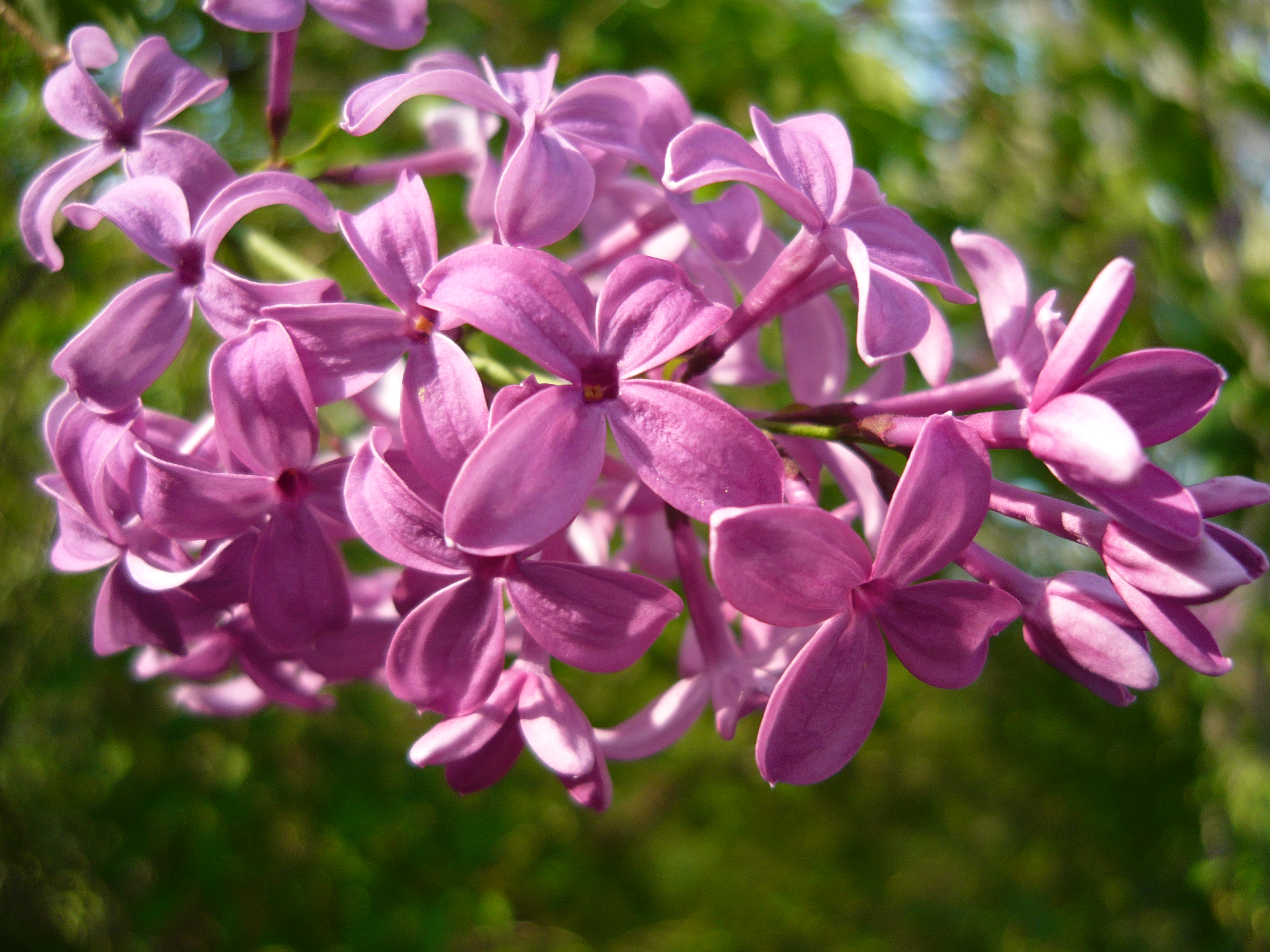 Syringa × chinensis. Real Jardín Botánico de Madrid.